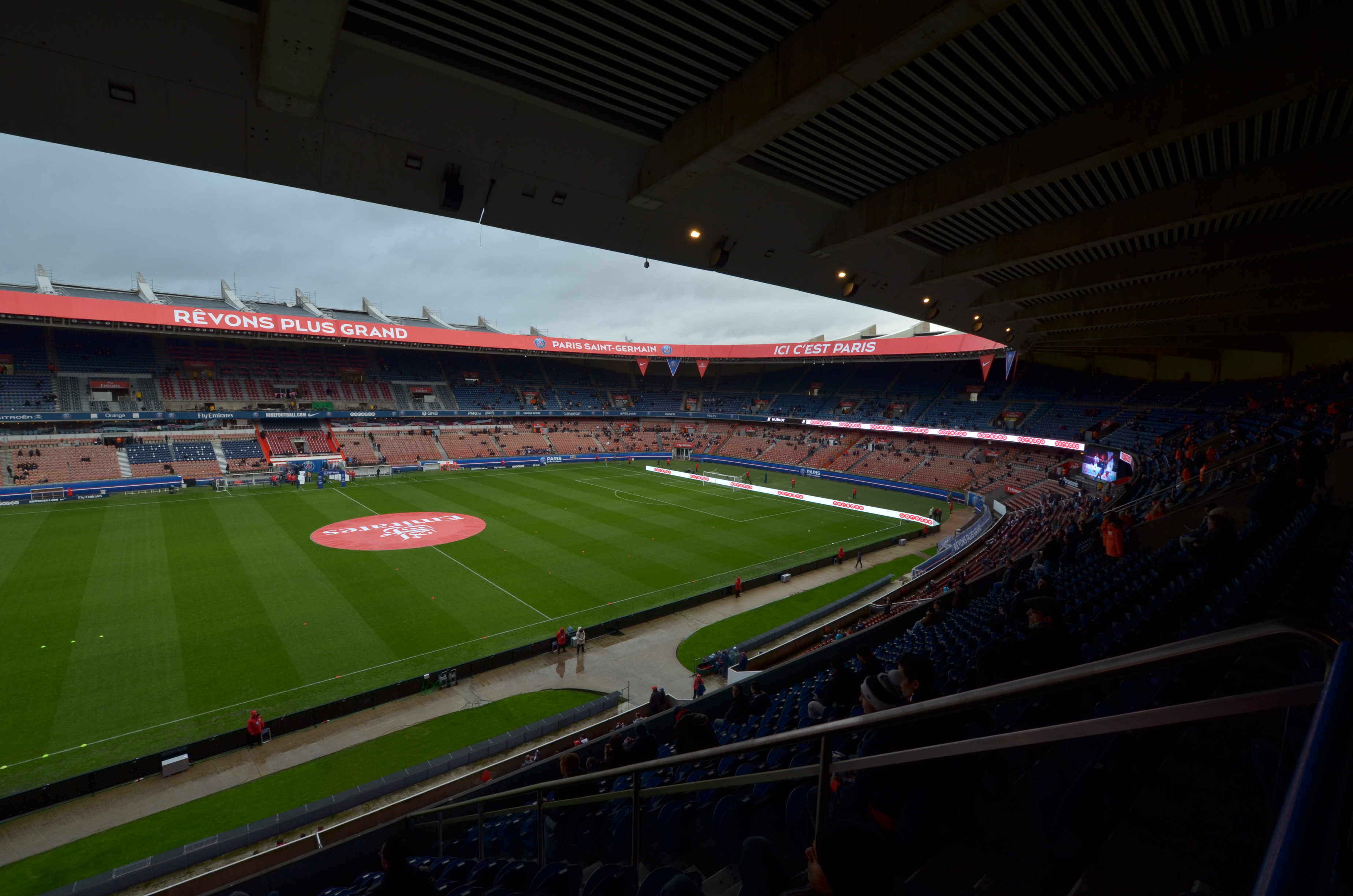 Prinzenparkstadion Tribune Auteuil - PSG gegen OGC Nizza am 09.11.2013